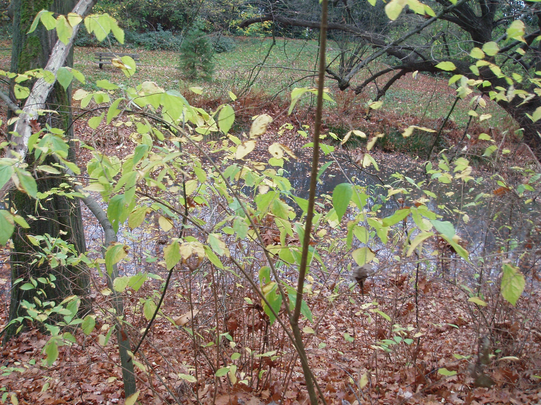 Vijver kasteel Le Paige